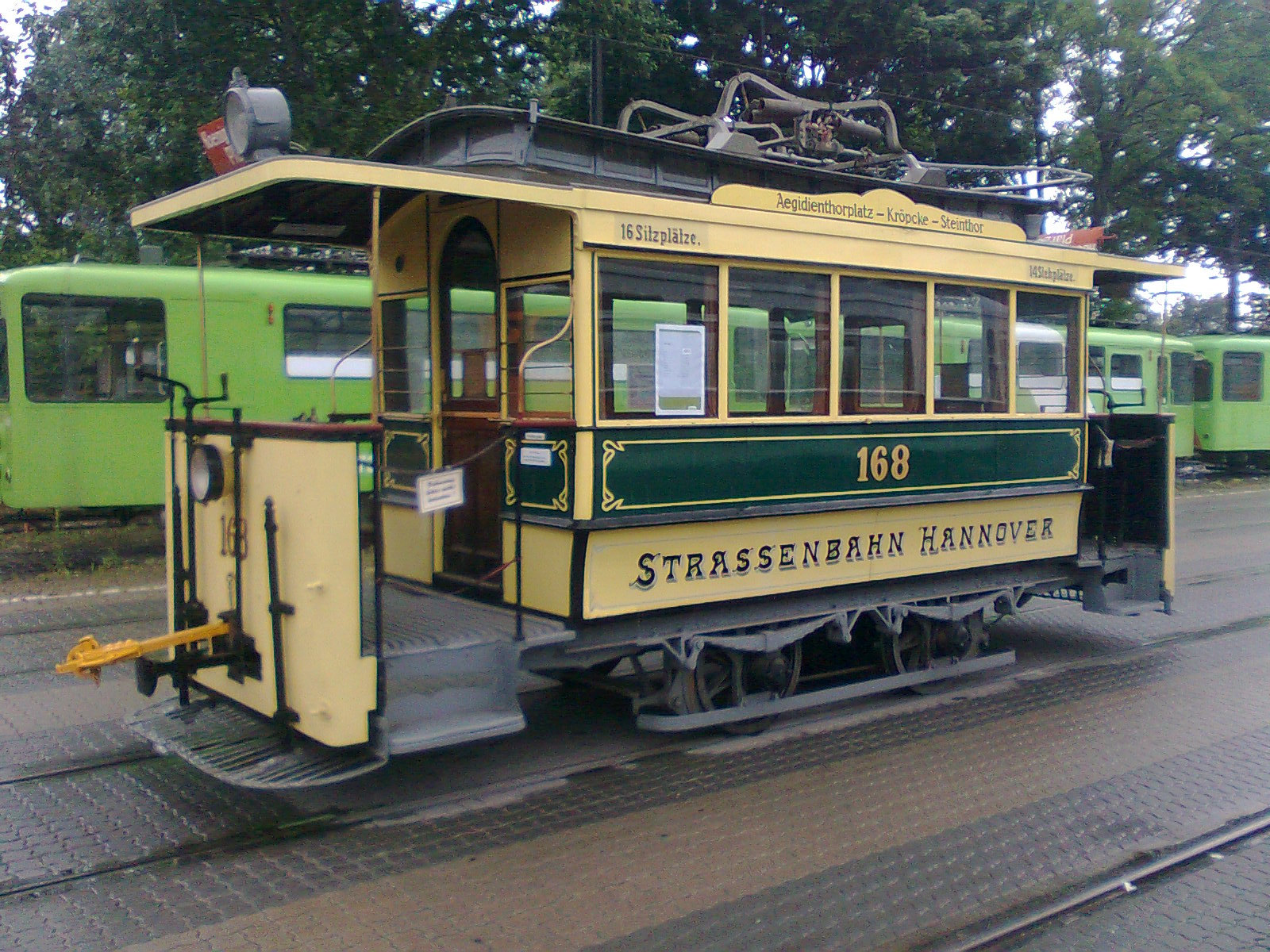 Tw 168 am Tag der offenen Tür Betriebshof Glocksee